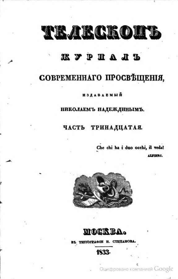 Обложка журнала «Телескоп»